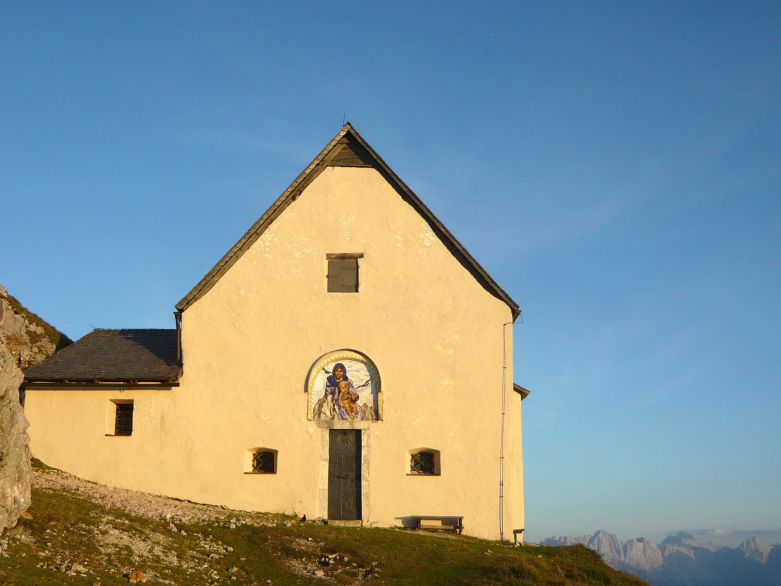 Kapelle Mariae Himmelfahrt, Windische Kapelle